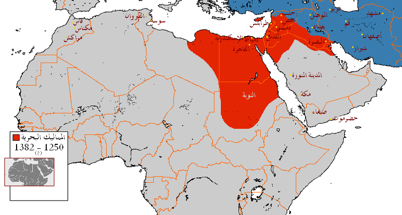 Bahri dynasty (1250-1382)